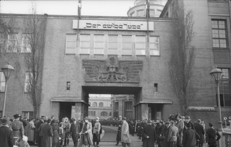 München, Ausstellung "Der ewige Jude" München.- Ausstellung "Der ewige Jude" im Deutschen Museum, 7. - 8.11.1937. Plakate an der Fassade